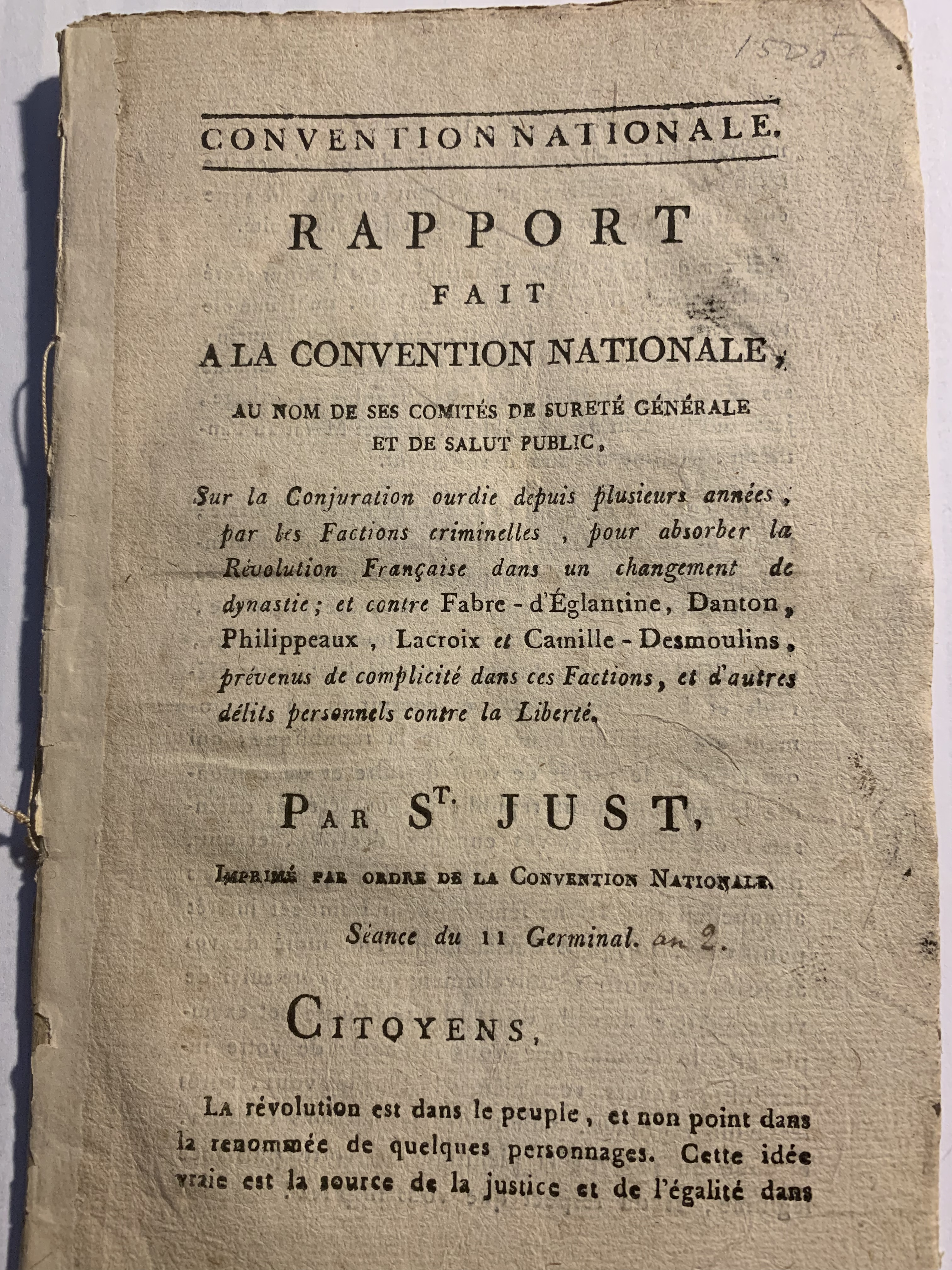 Accusation des Dantonistes